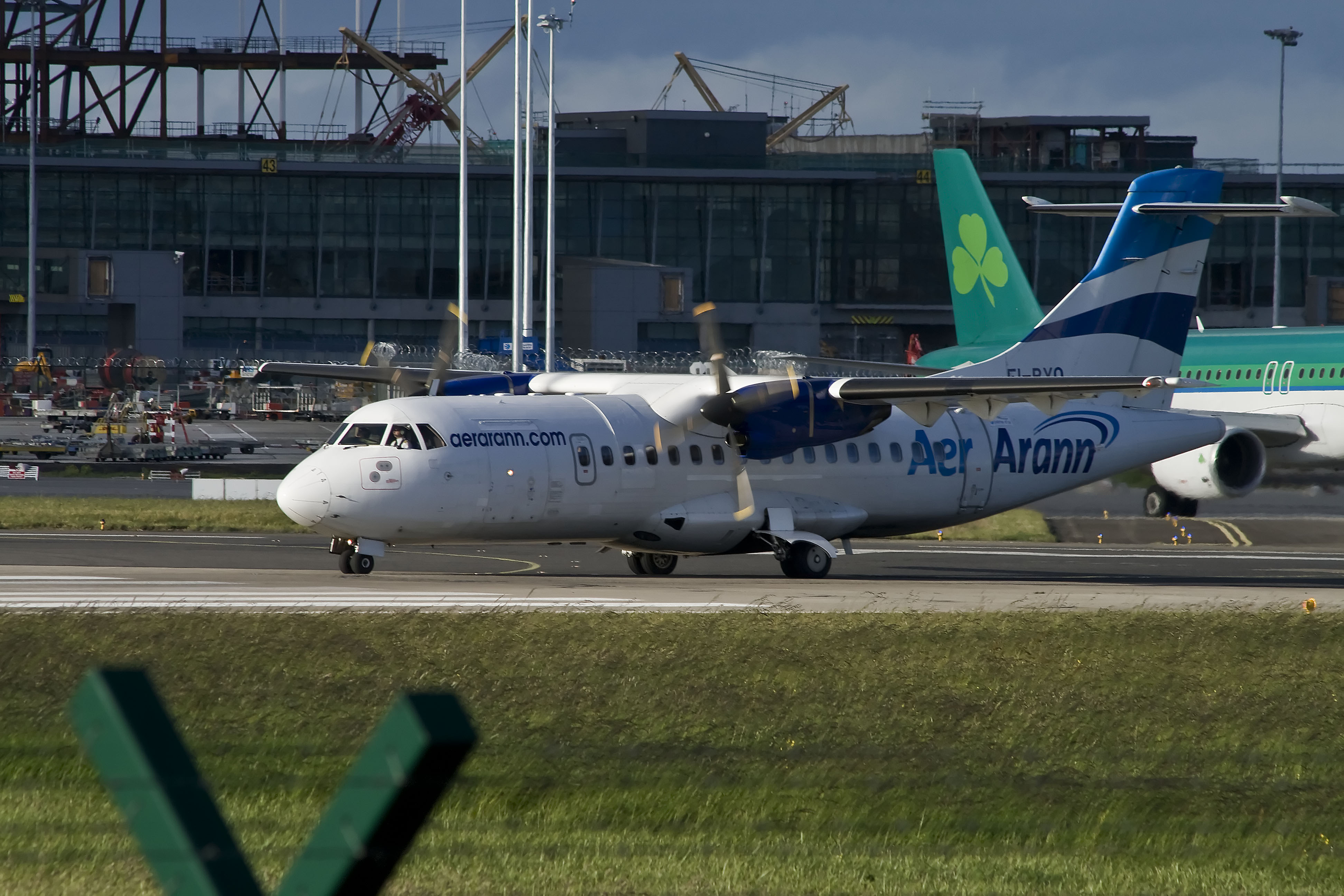 ATR 42-300 EI-BYO Aer Arann